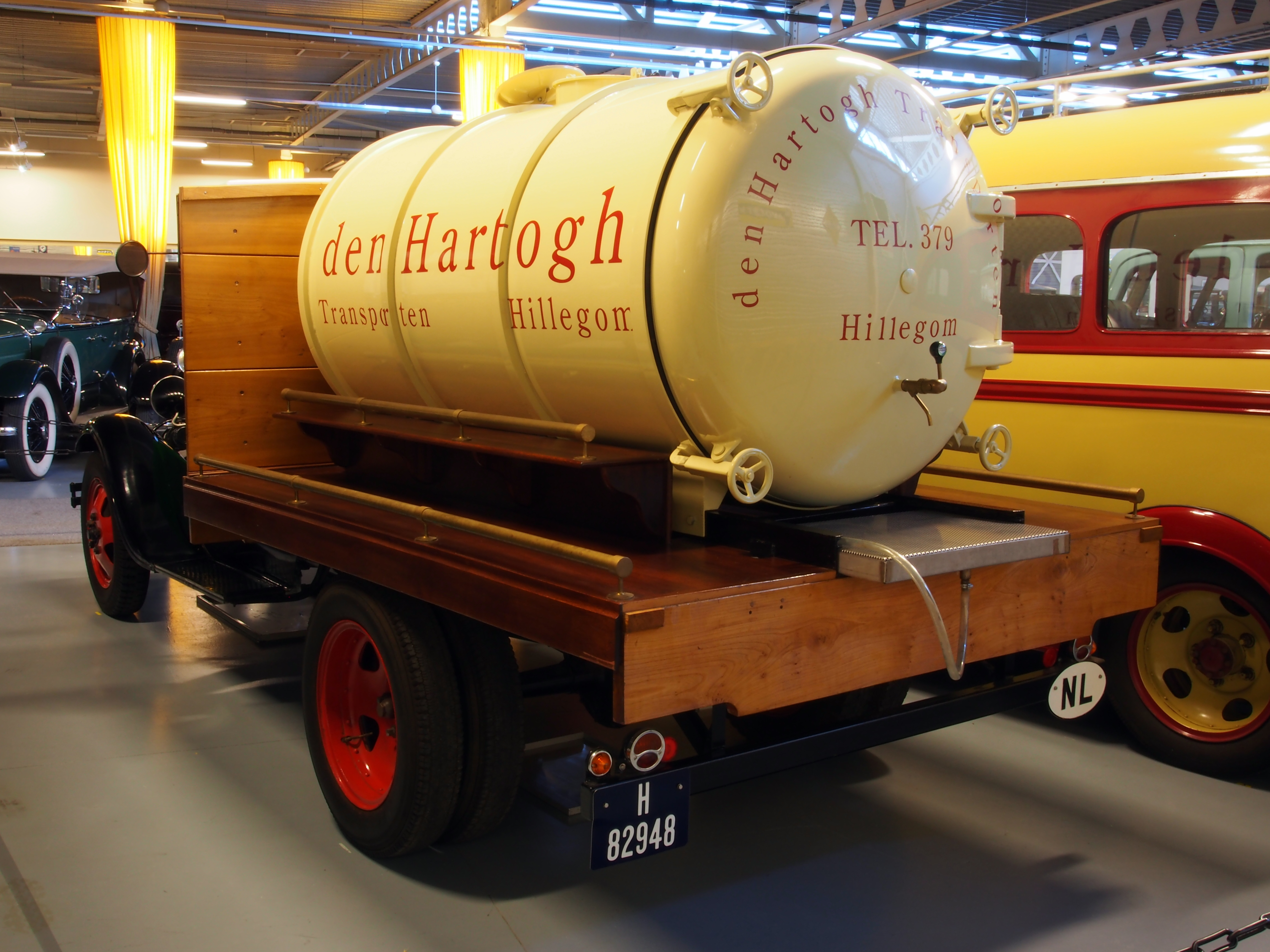 Den Hartogh Ford Museum.